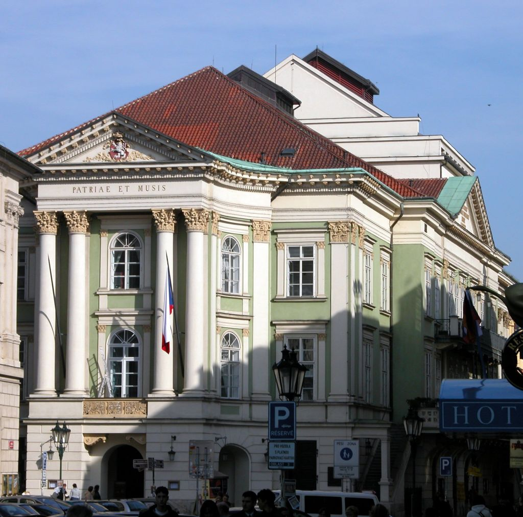 Prag: Ständetheater